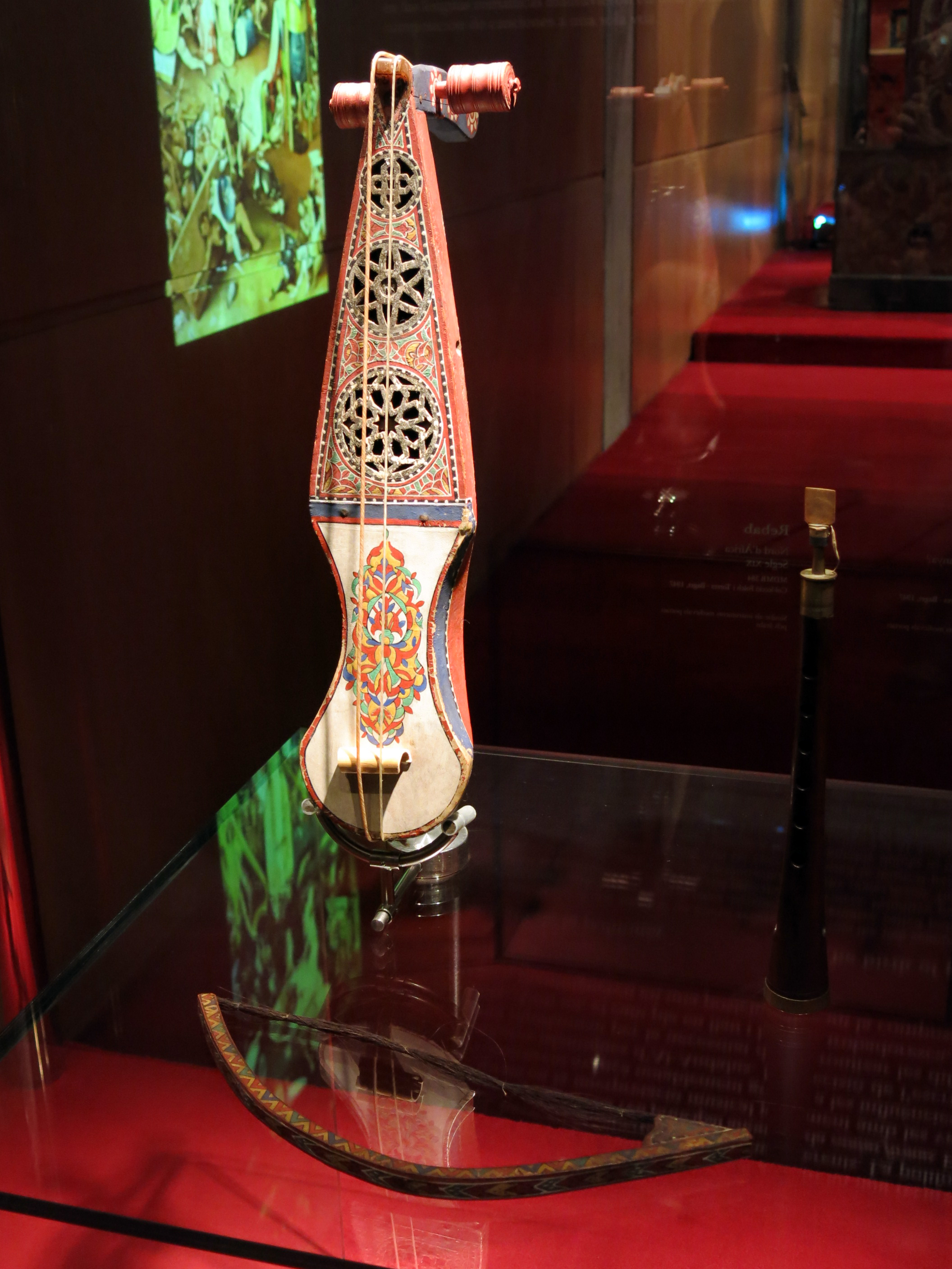 Rebab. Àfrica; Magrib. Segle XIX. Museu de la Música. (MDMB 384)